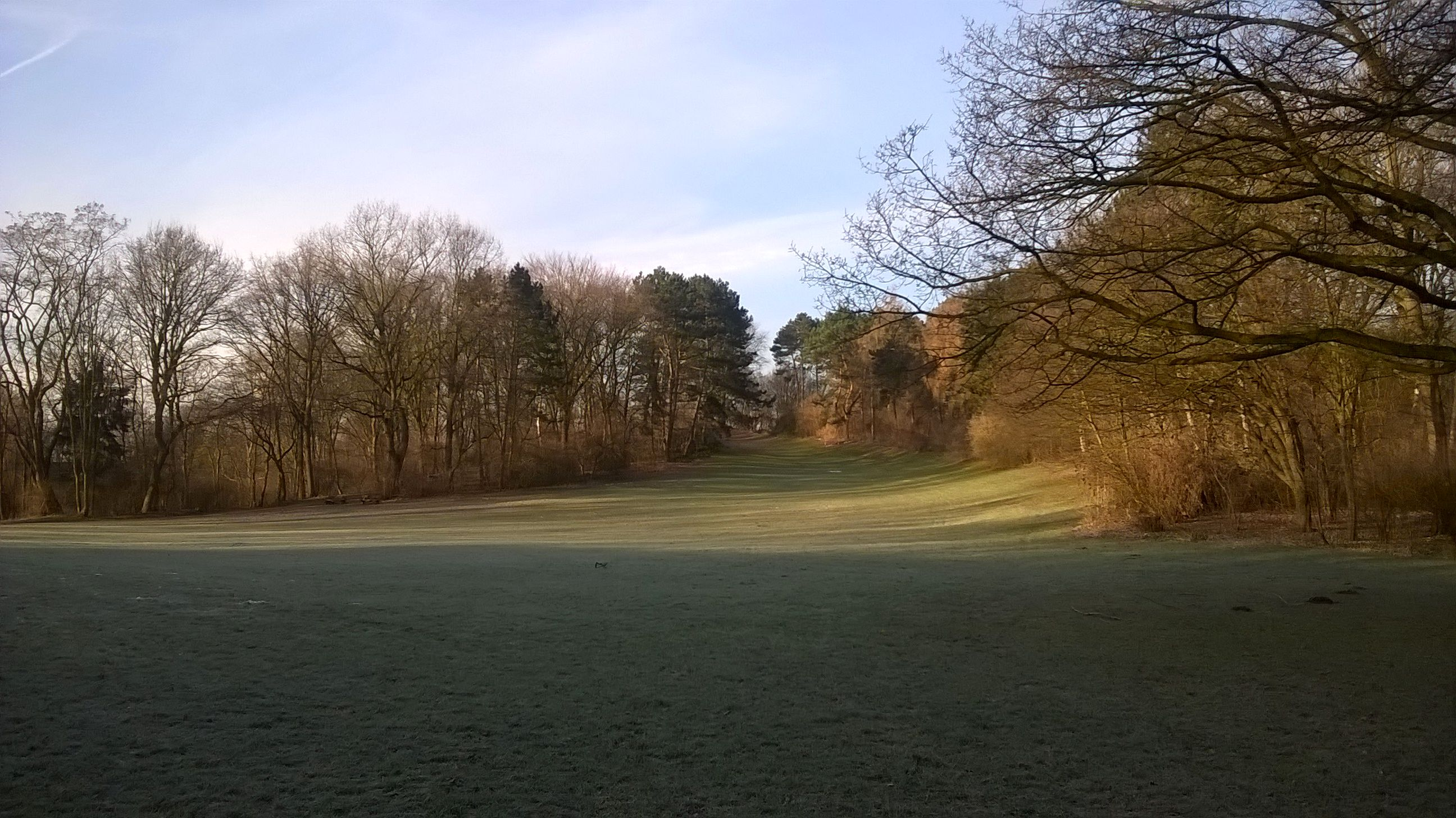 Horner Park im Hamburger Stadtteil Horn, Blick von der Horner Landstraße Richtung Südwesten